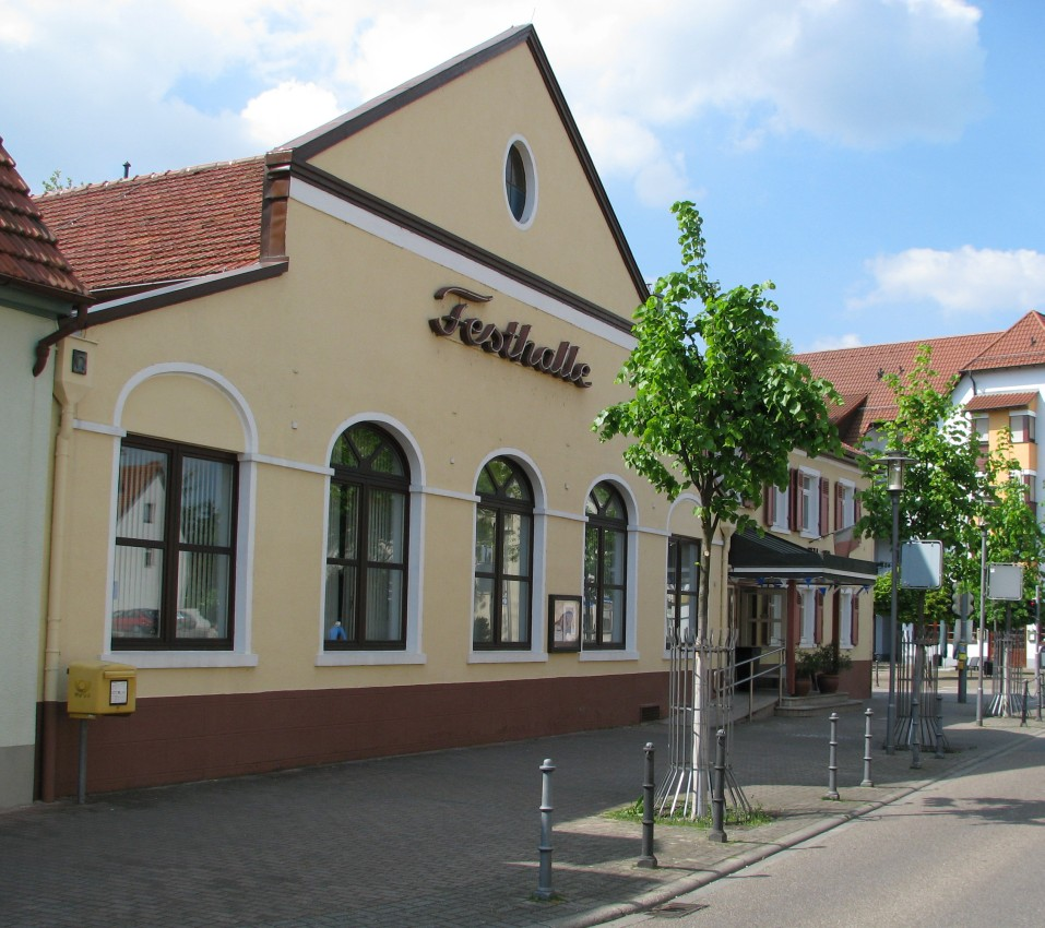 Festhalle in Brühl